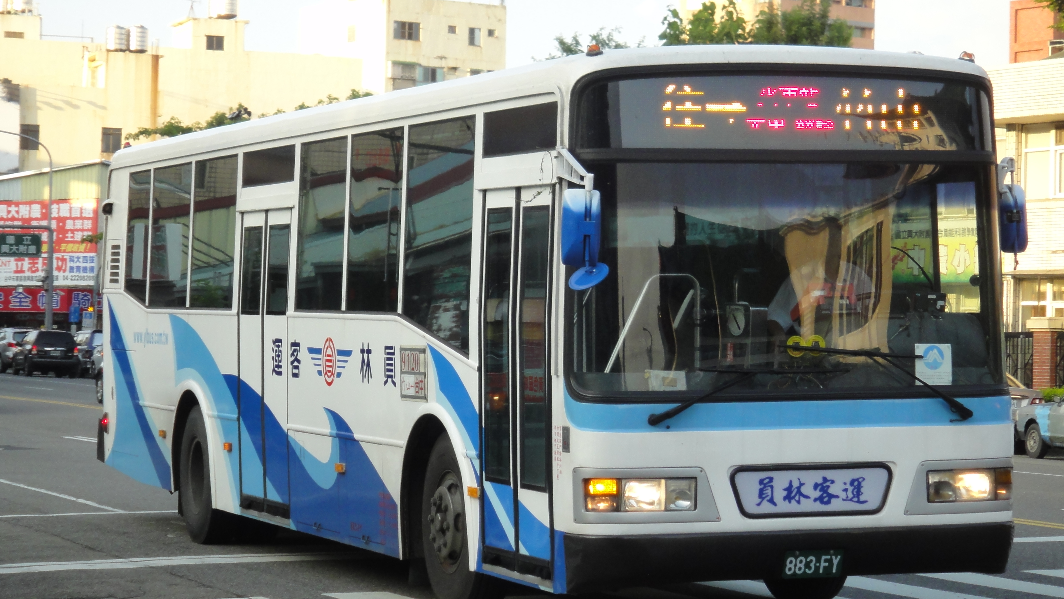 員林客運日野大客車883-FY(台北客運轉籍車輛)